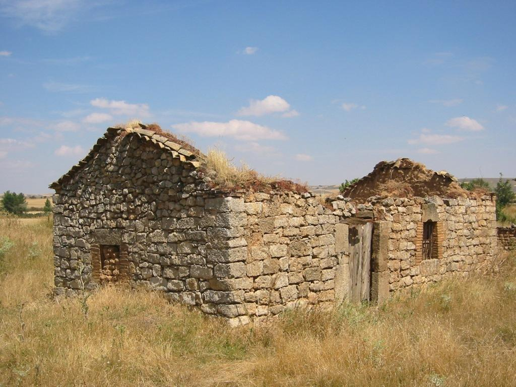 Villamoron_Fragua